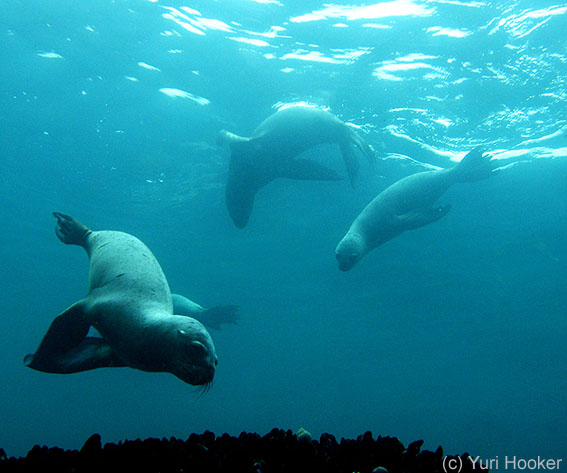 Lobos marinos juveniles buceando sobre un arrecife rocoso cubierto de mitilidos (Aulacomya atra). Isla San Gallan, Reserva Nacional de Paracas, Perú.